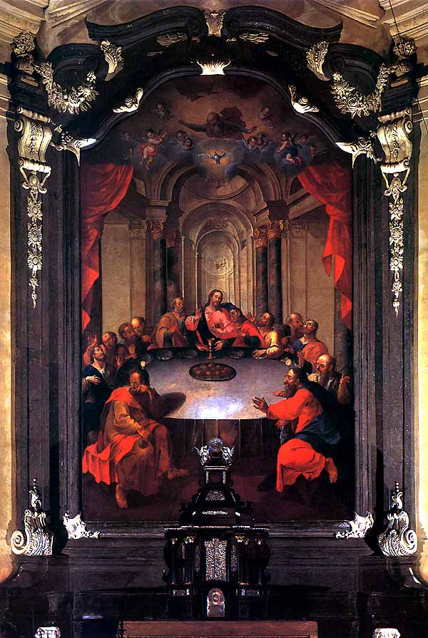 Тайная вячэра. 1753. Палатно, алей 720х450. Галоўны алтар. Касцёл Божага цела, езуіцкі. Нясвіж. Мастак - Гескі Kсаверы Дамінік.